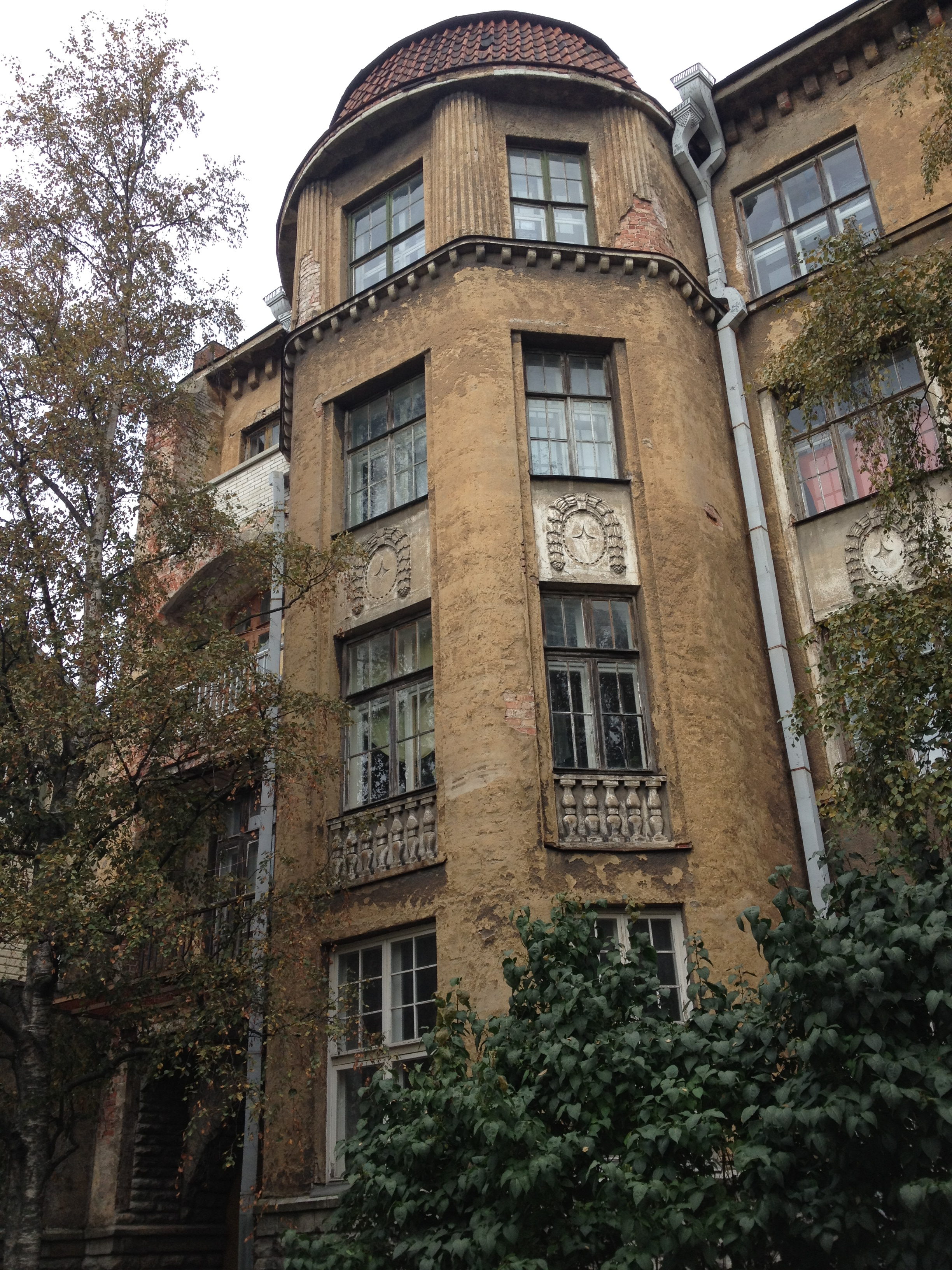 Elamu Tatari tn 21b, 1912.a.